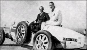 José de Padierna Villapadierna sobre un Bugatti Type 35 (hacia 1930)